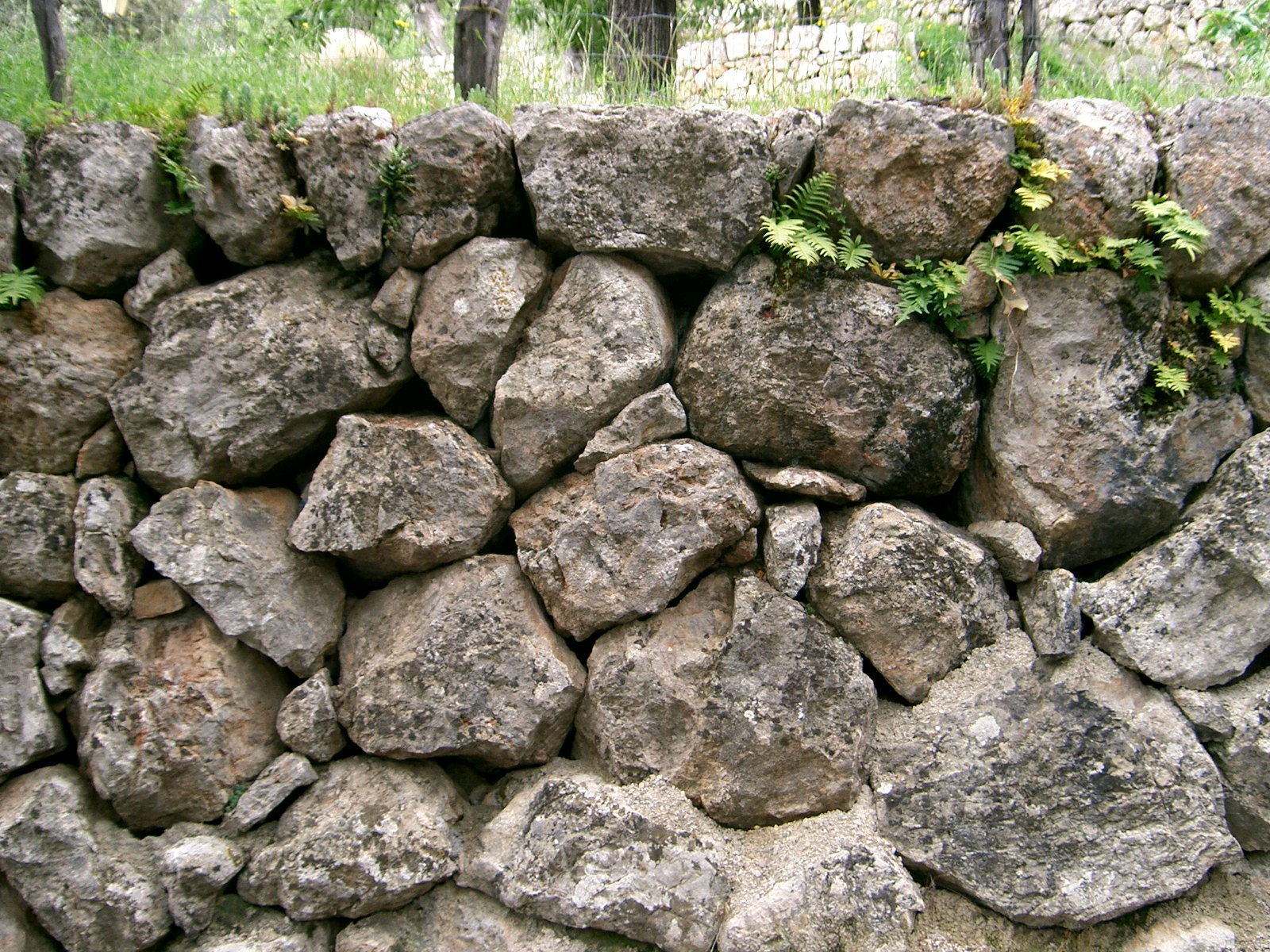 Marge en detall, Fornalutx.